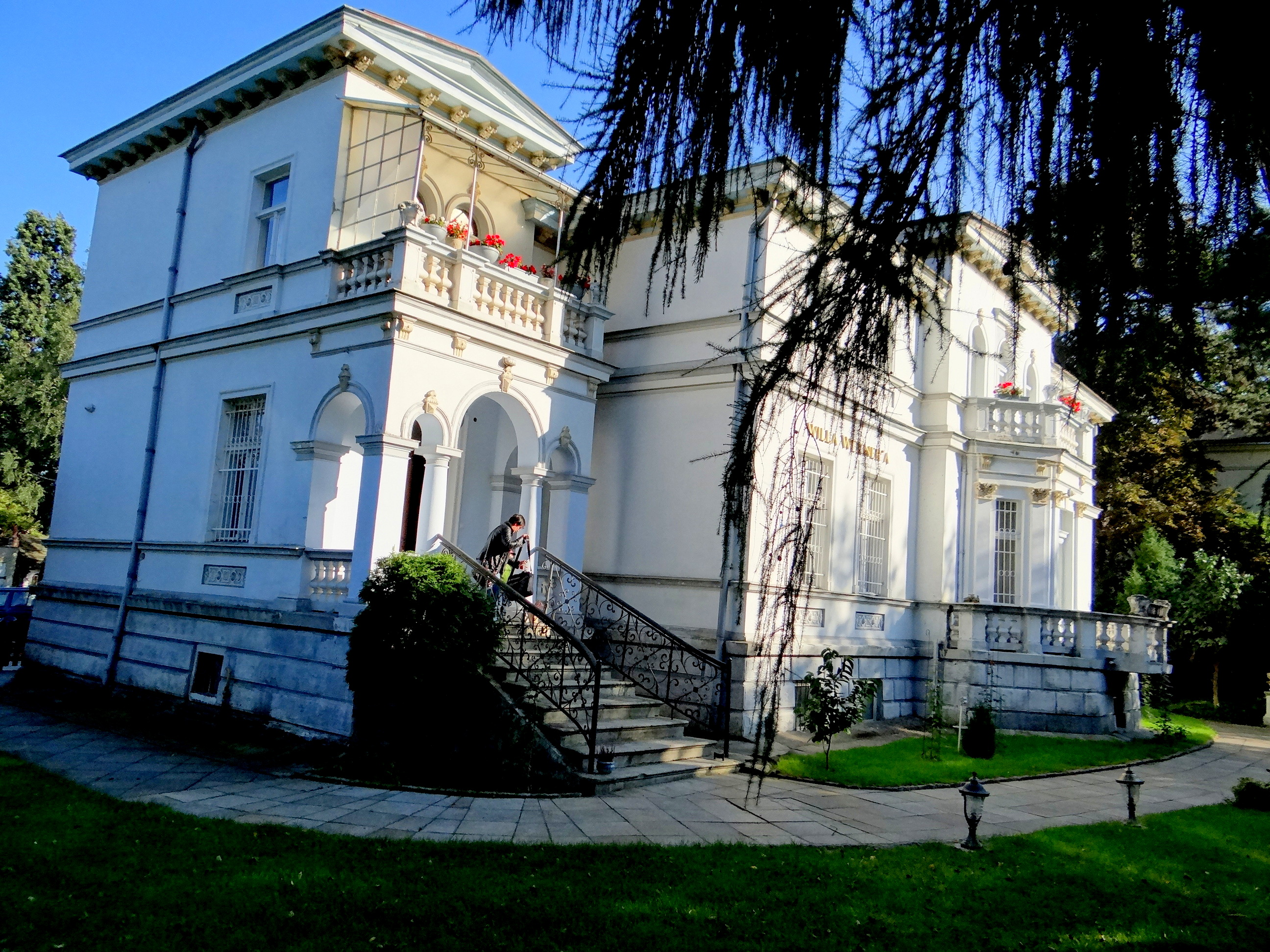 Zespół willowy: willa, ogród, altana ul. Kościuszki 41, Sopot